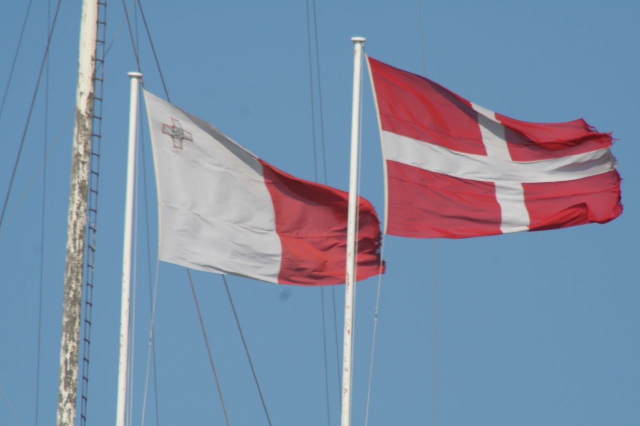 Maltese flags